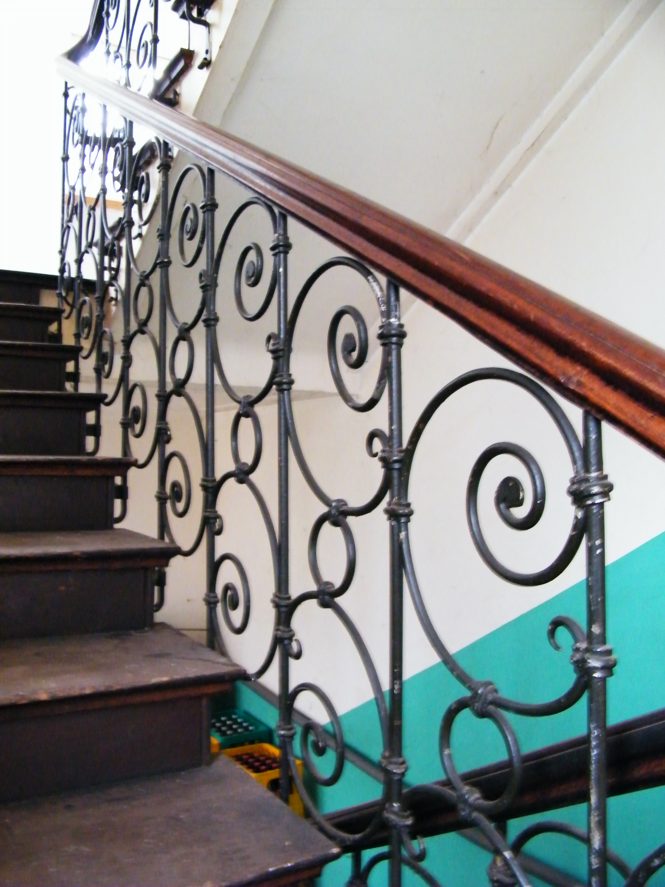 Künstlerhaus Kempten - Hinteres Treppenhaus